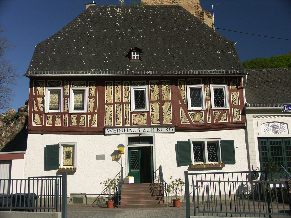 Vári borház, Wiesbaden